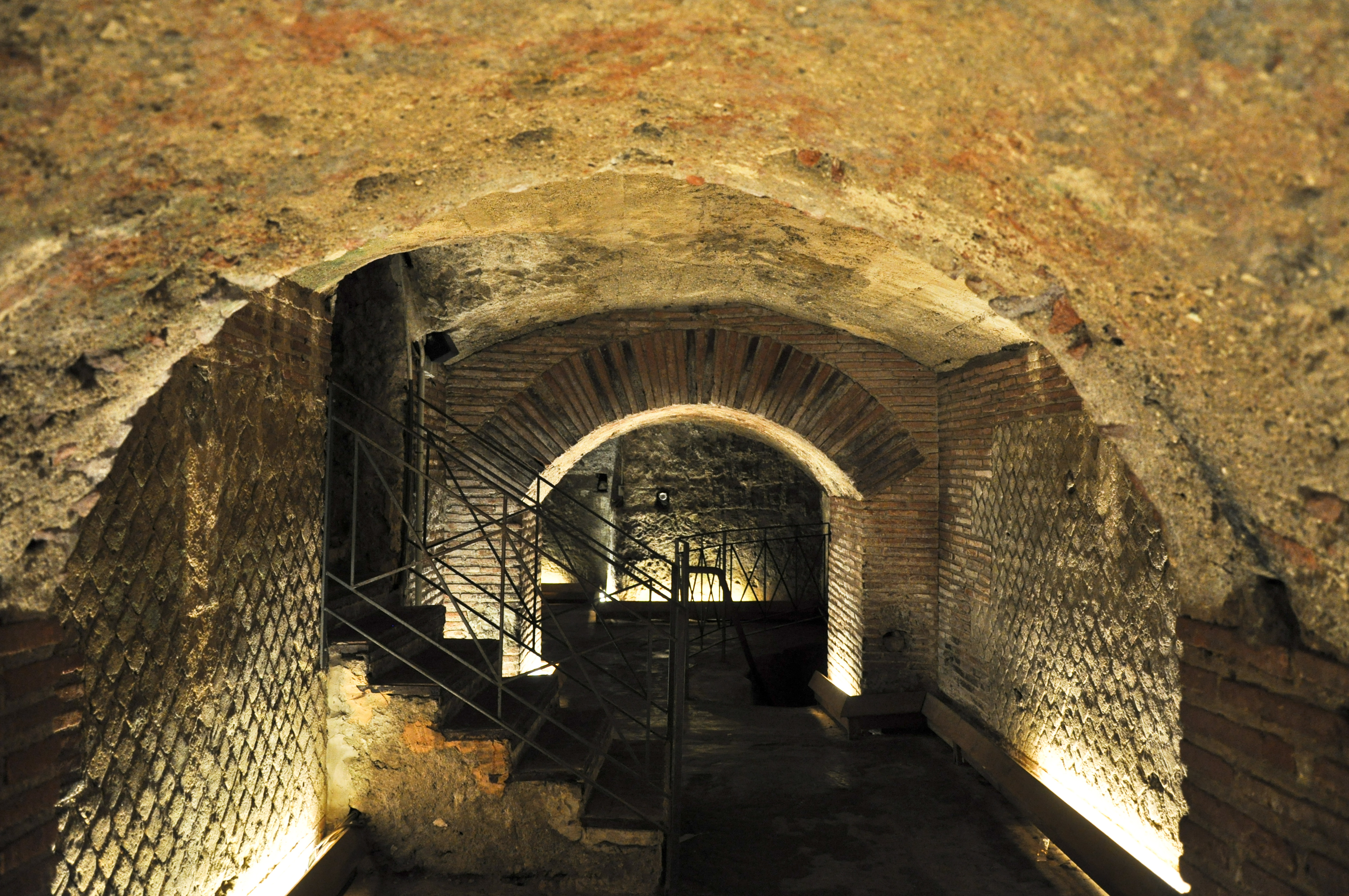 ...ancora il proscenio e una delle scale di accesso al palcoscenico...